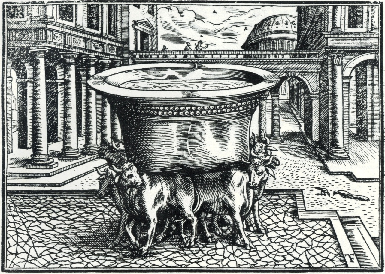 Nádoba na vodu zvaná Moře nesená bronzovými býky v Šalamounově chránu, dřevoryt Melantrichovy Bible z roku 1570